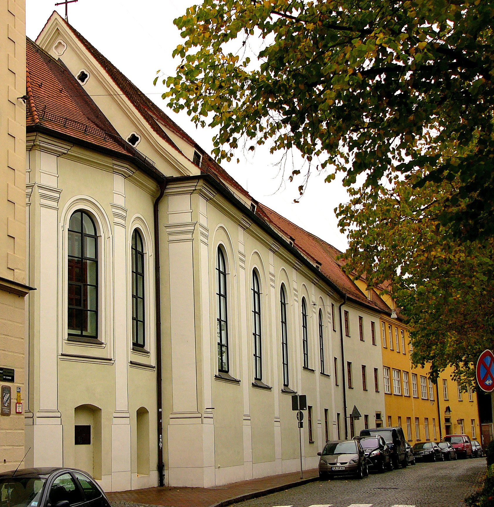 Ehem. Franziskanerinnenkloster Hl. Kreuz - WestansichtThis is a photograph of an architectural monument.